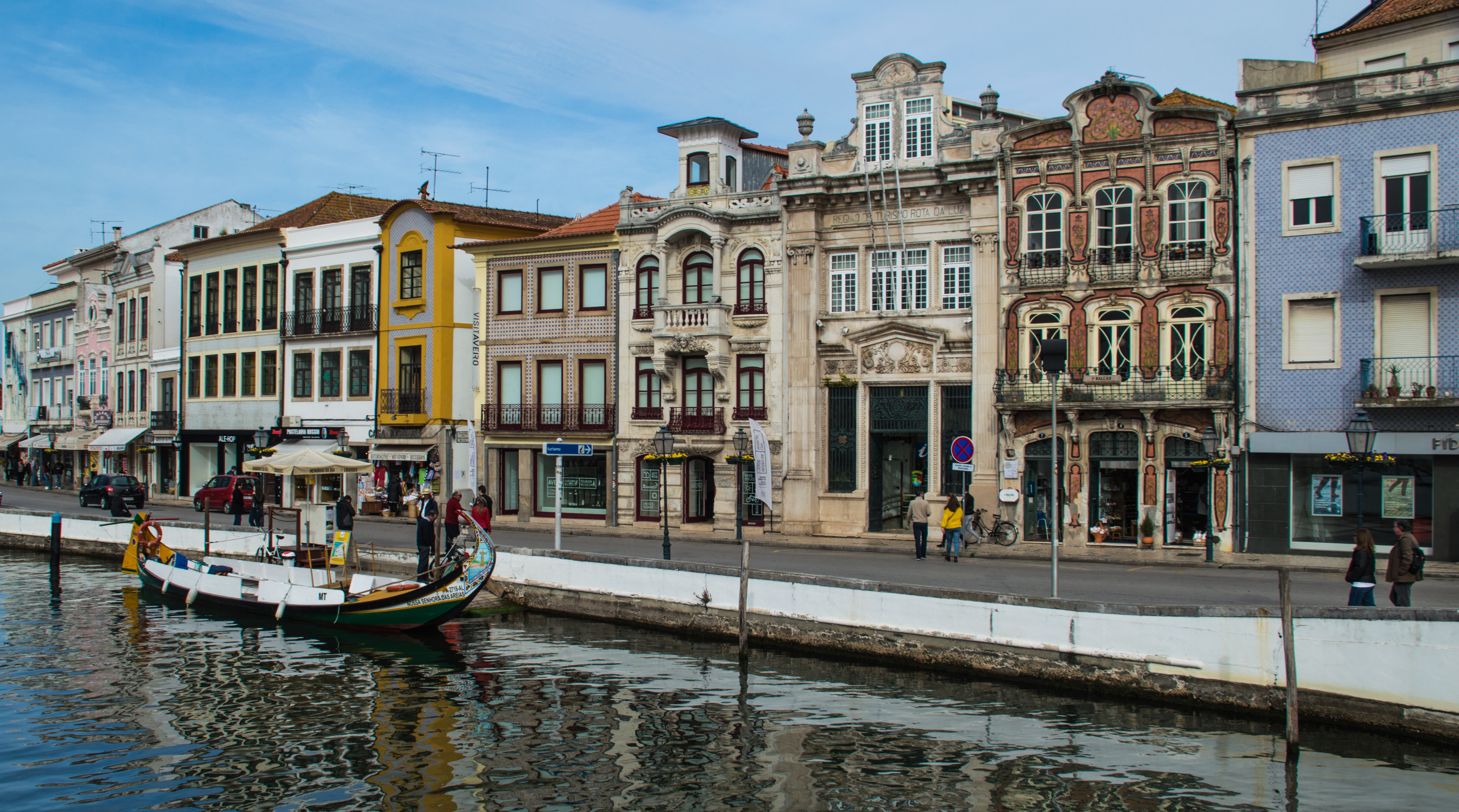 Ilha Dos Puxadoiros